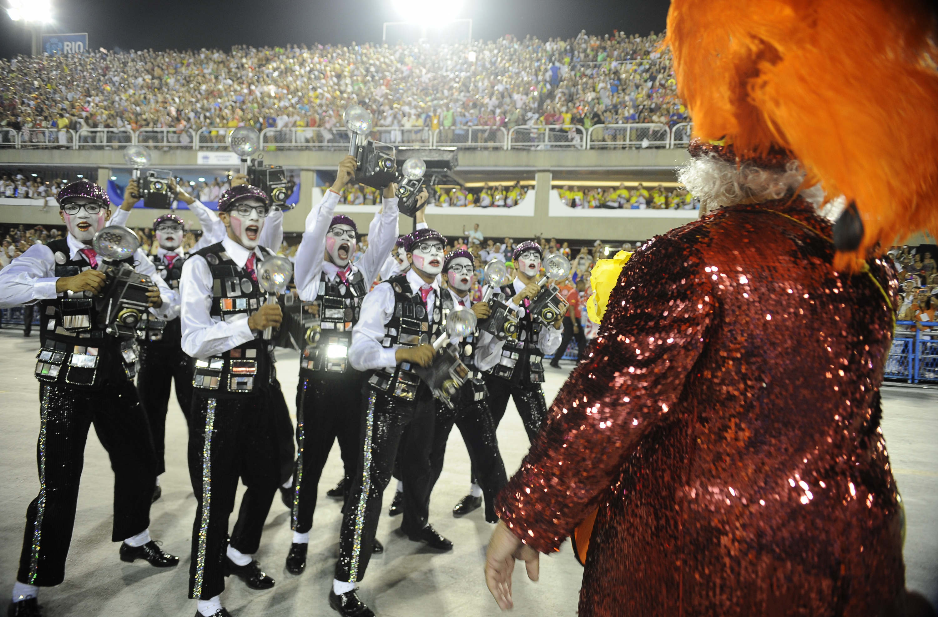 Rio de Janeiro - Unidos do Salgueiro foi a segunda escola a desfilar no primeiro dia de apresentações do Grupo Especial no Rio (Tânia Rêgo/ABr)